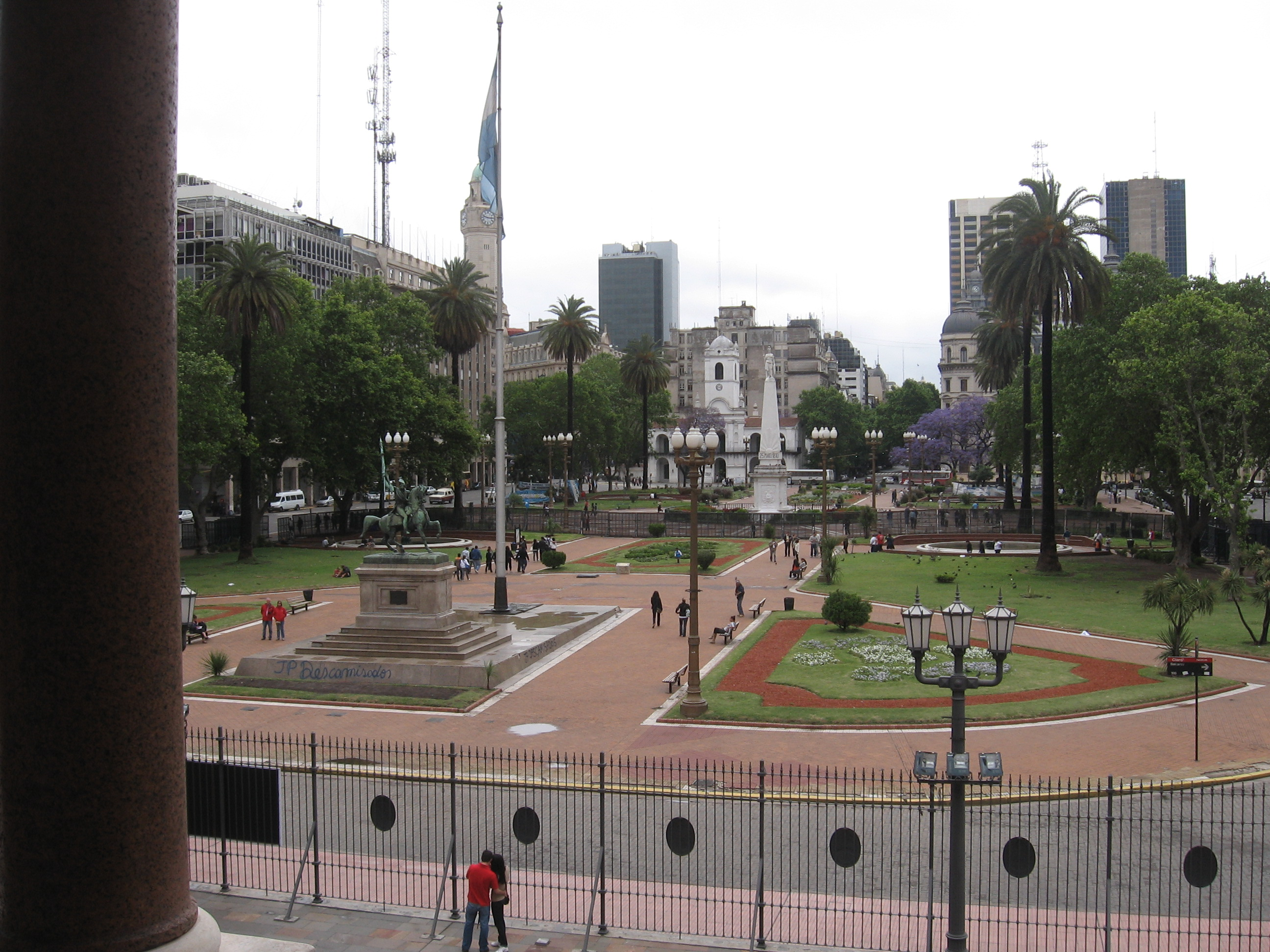 Plaza de Mayo, vista desde el balcón de la Casa Rosada (Nota: se puede entrar al famoso balcón durante las visitas guiadas comunes)